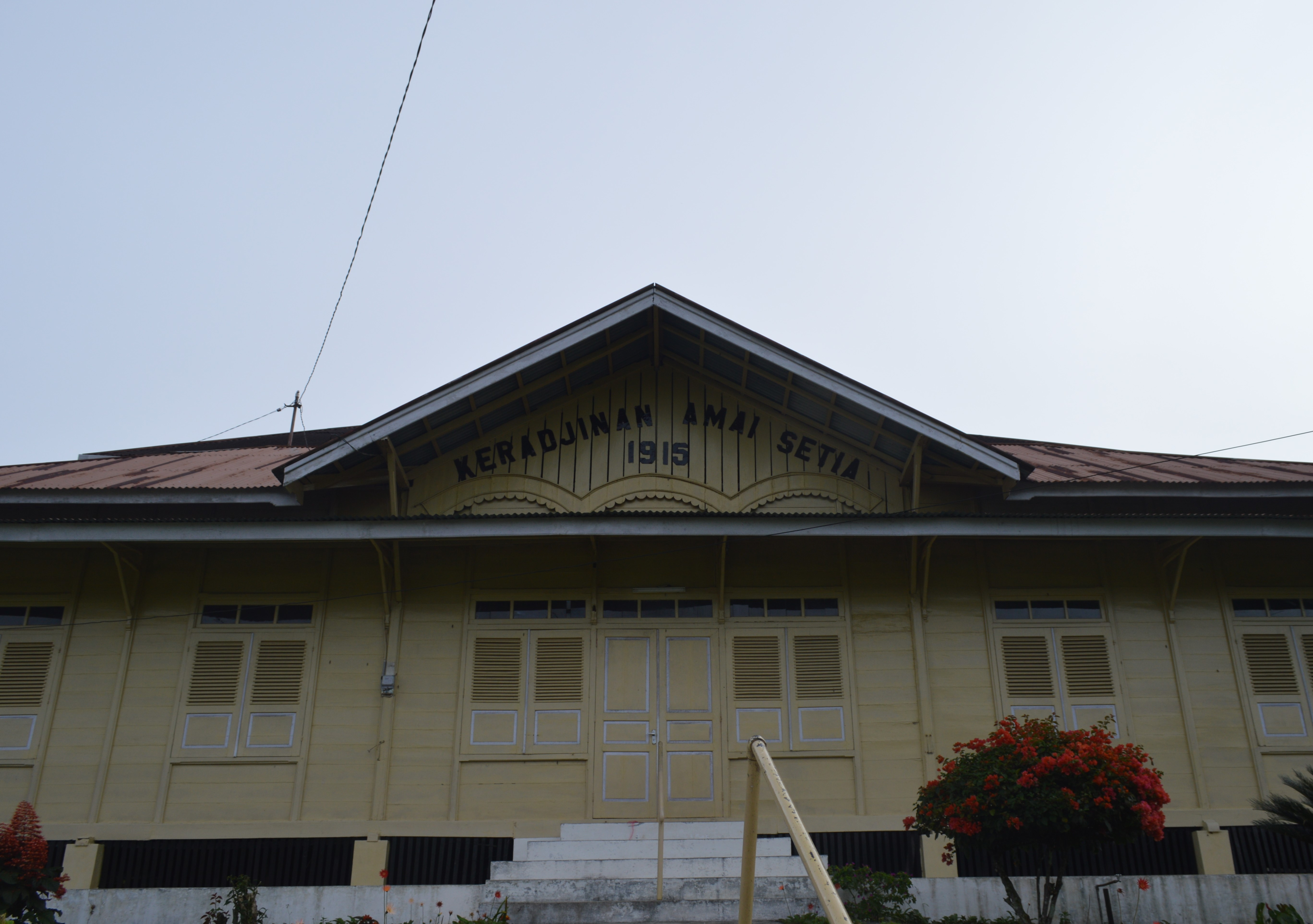 Kerajinan Amai Setia